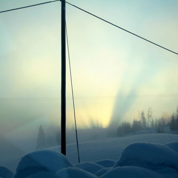 Foto tatt av Morten W. Gjul 2008 på Inderøya. Tittel "Vinterlys"